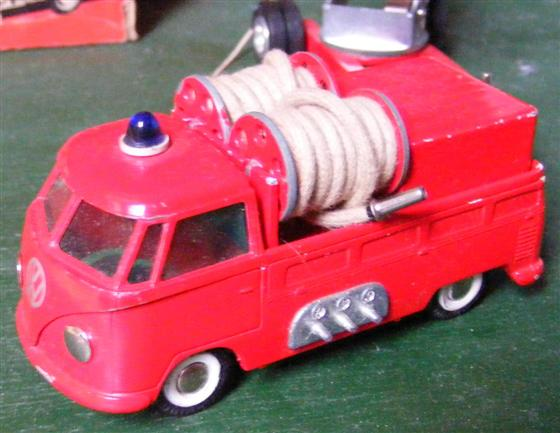 Volkswagen Transporter, modelauto door Tekno Denemarken